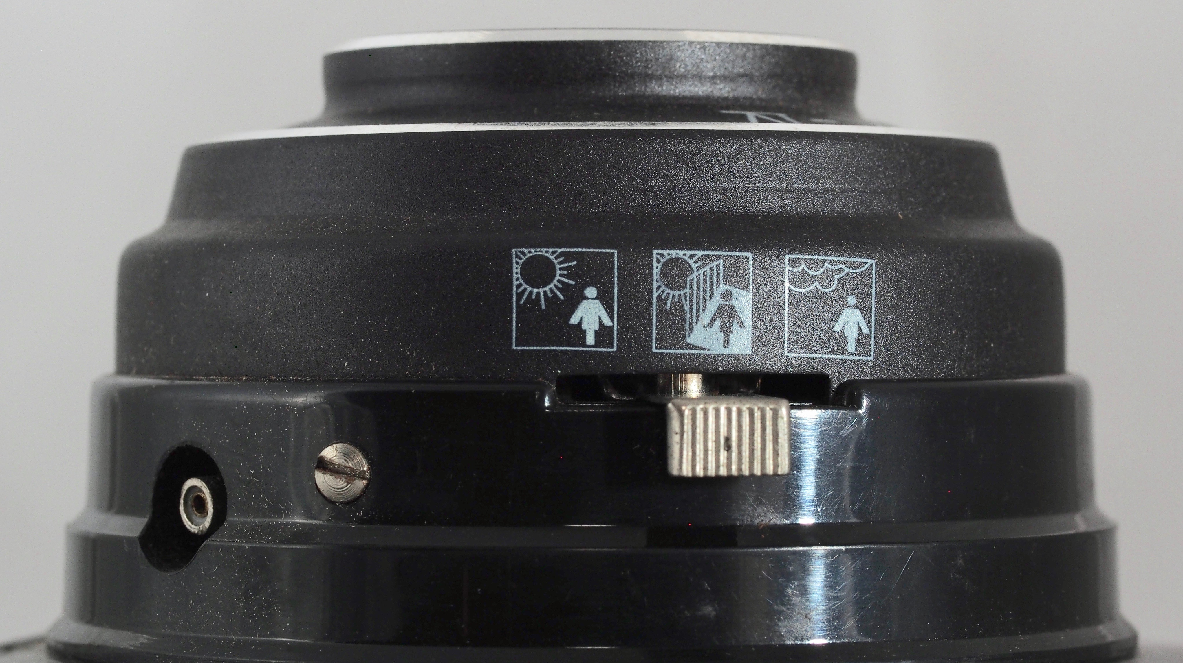 Click Blende 3 Symbole bei Click IV